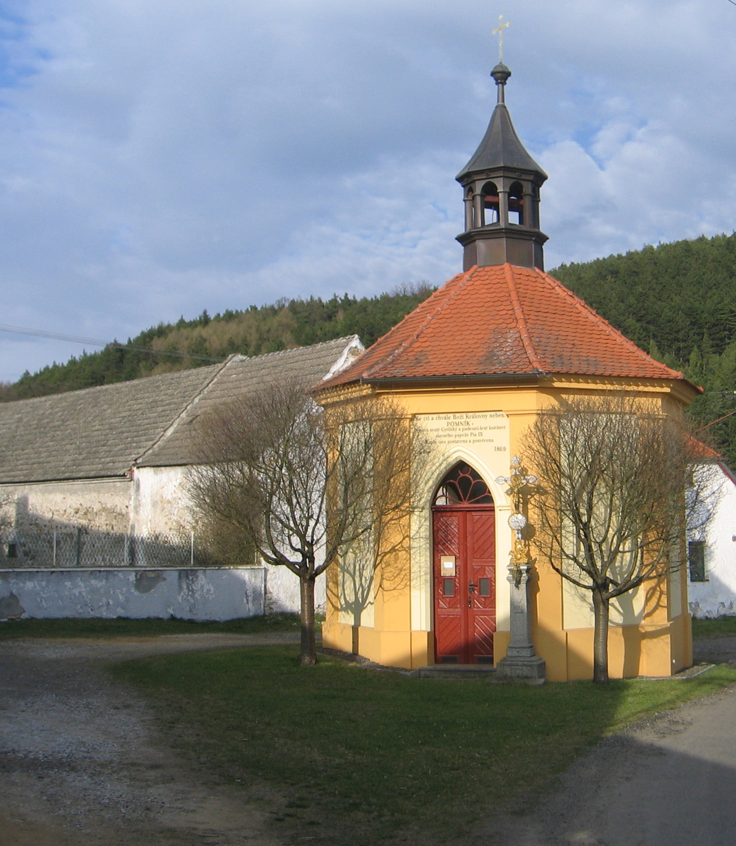 Dobršín (okr. Klatovy), kaple od jihozápadu.